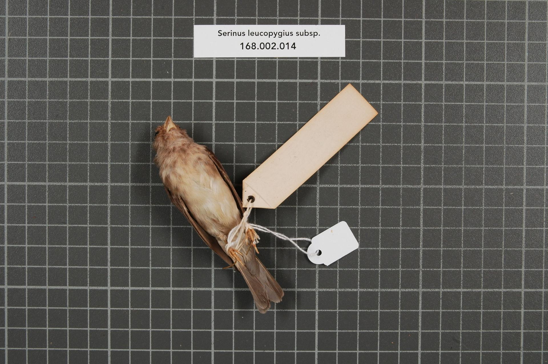 Serinus leucopygius subsp.